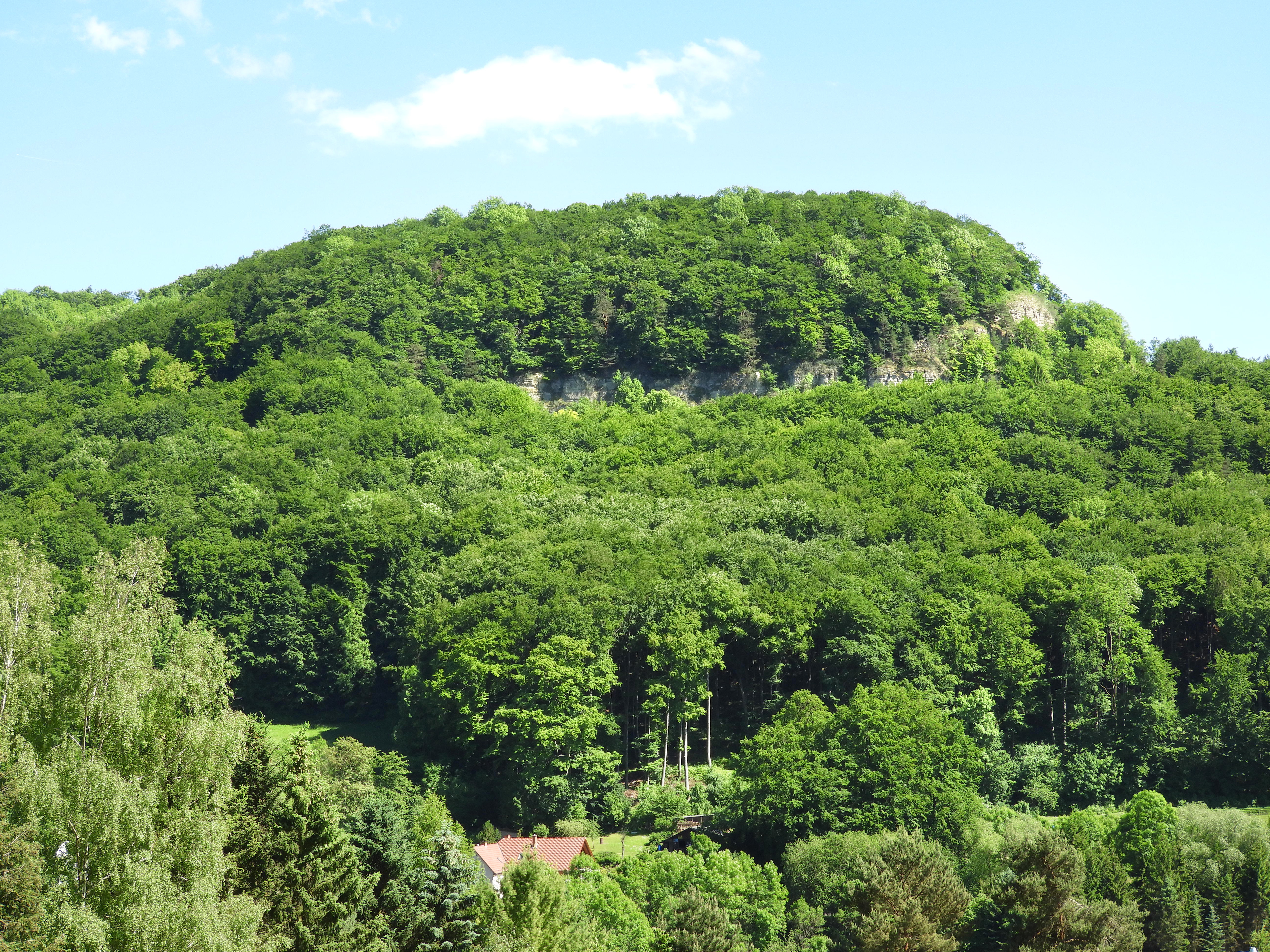 Die „Salzfrau“ gehört zu Aussichtspunkten auf Felskanten im Naturschutzgebiet der „Hessischen Schweiz“. Steilabbrüche, Kalkfelsen und steile Abhänge zur Werra hin prägen das Gebiet. Das beliebte Wandergebiet ist durch eine Vielzahl von Wanderpfaden und Forstwegen erschlossen. Darunter sind der Premiumwanderweg P4 und der Werra-Burgen-Steig Hessen X5H.